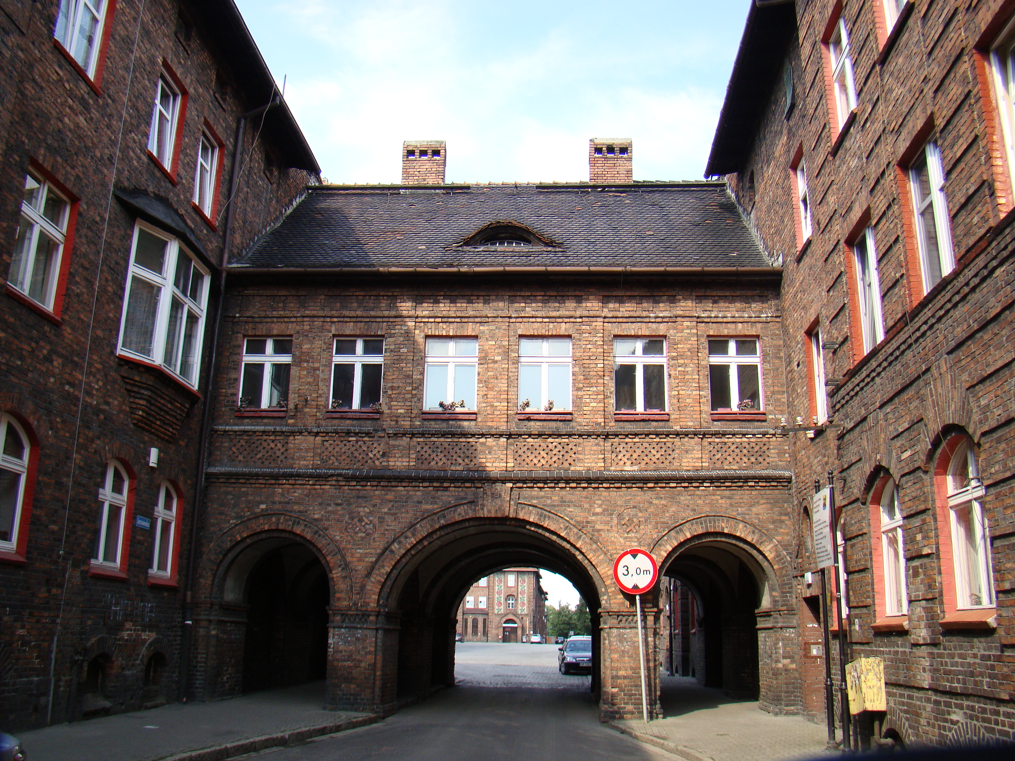 Katowice, układ urbanistyczno-przestrzenny osiedla robotniczego Nikiszowiec, 1908-1918